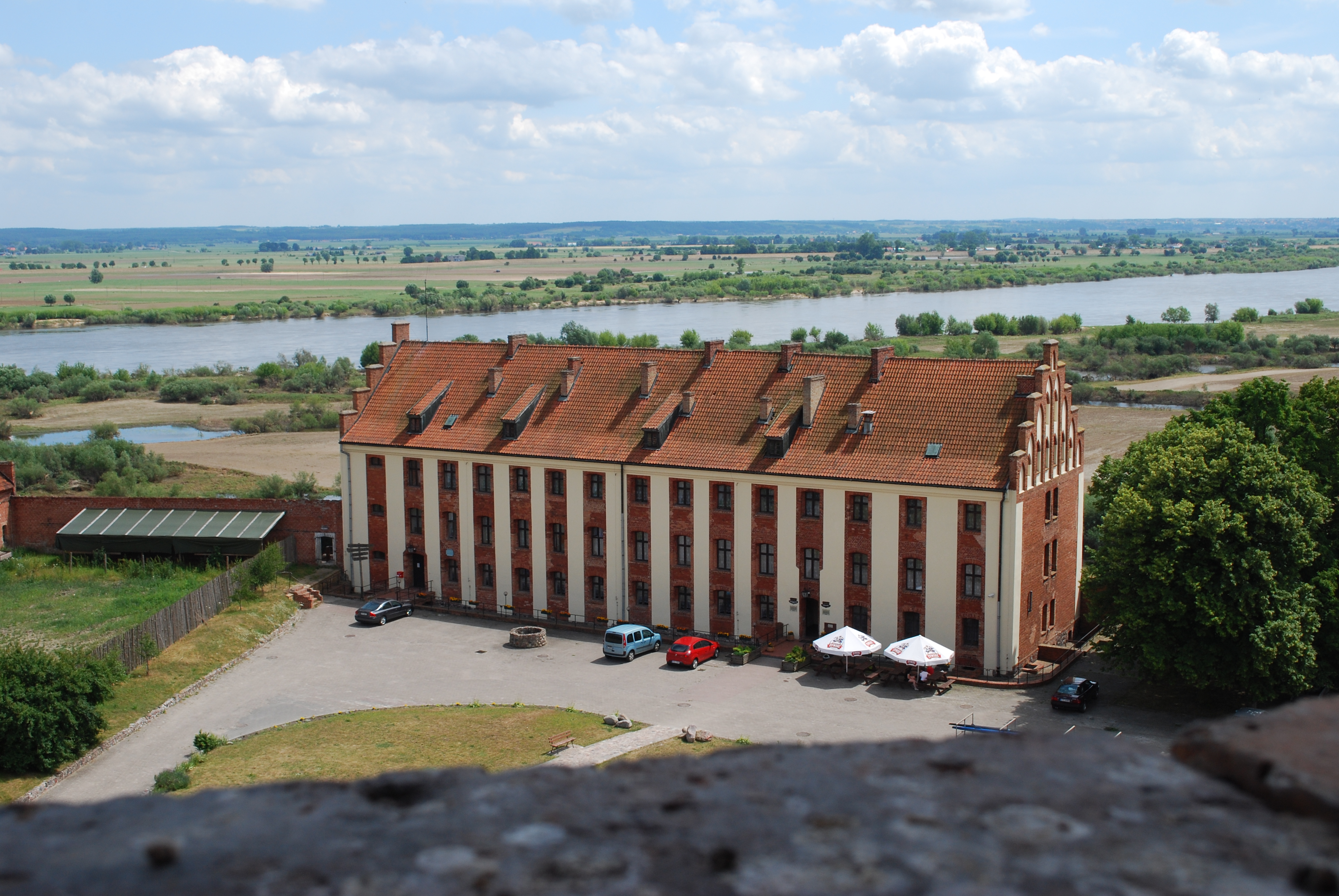 Gniew - "Pałac Marysieńki", dawny budynek gospodarczy, obecnie hotel w zespole zamkowym, 1674, XIX